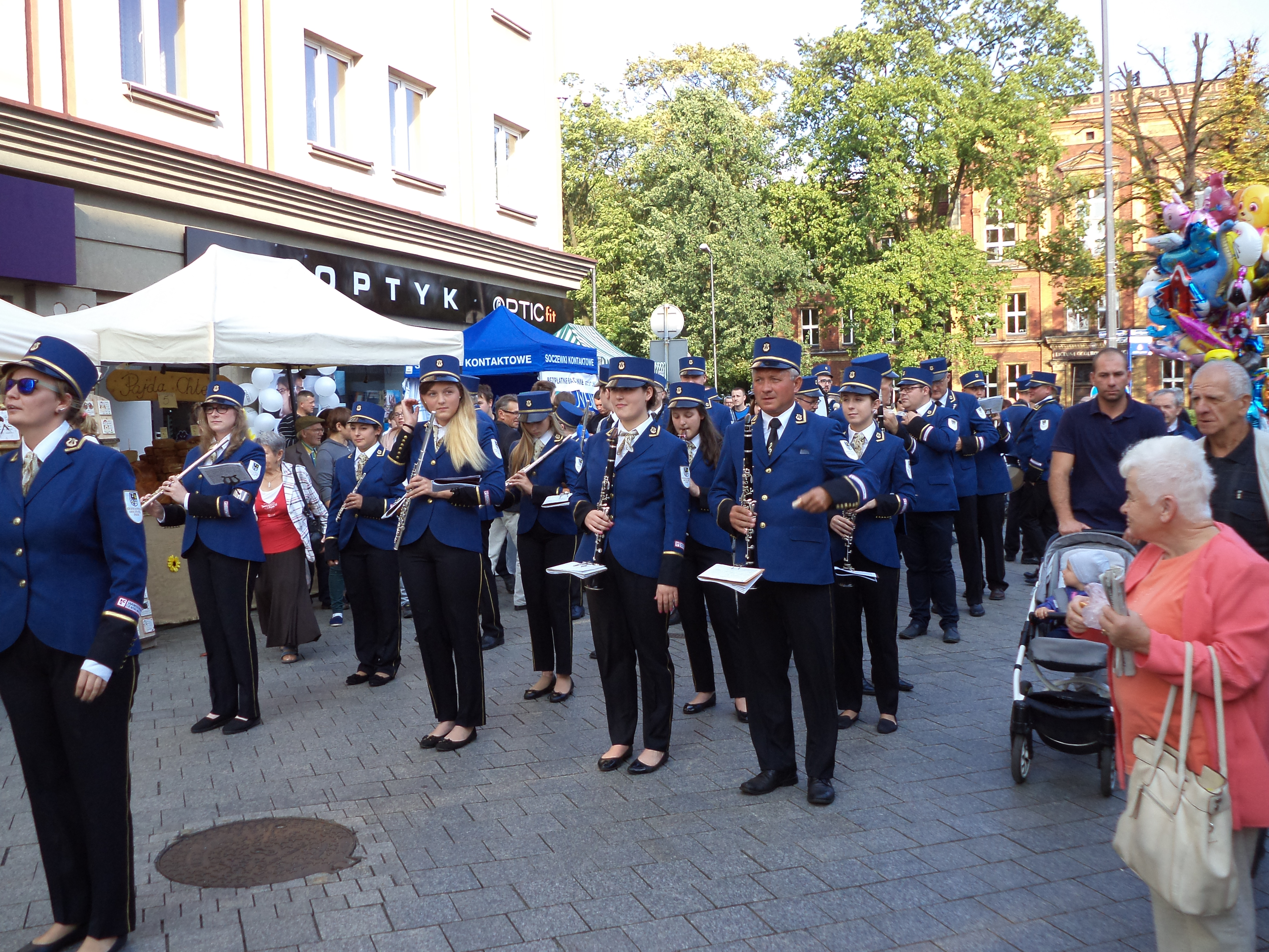 Tarnogórska Orkiestra Dęta na placu Wolności i ul. Krakowskiej w Tarnowskich Górach